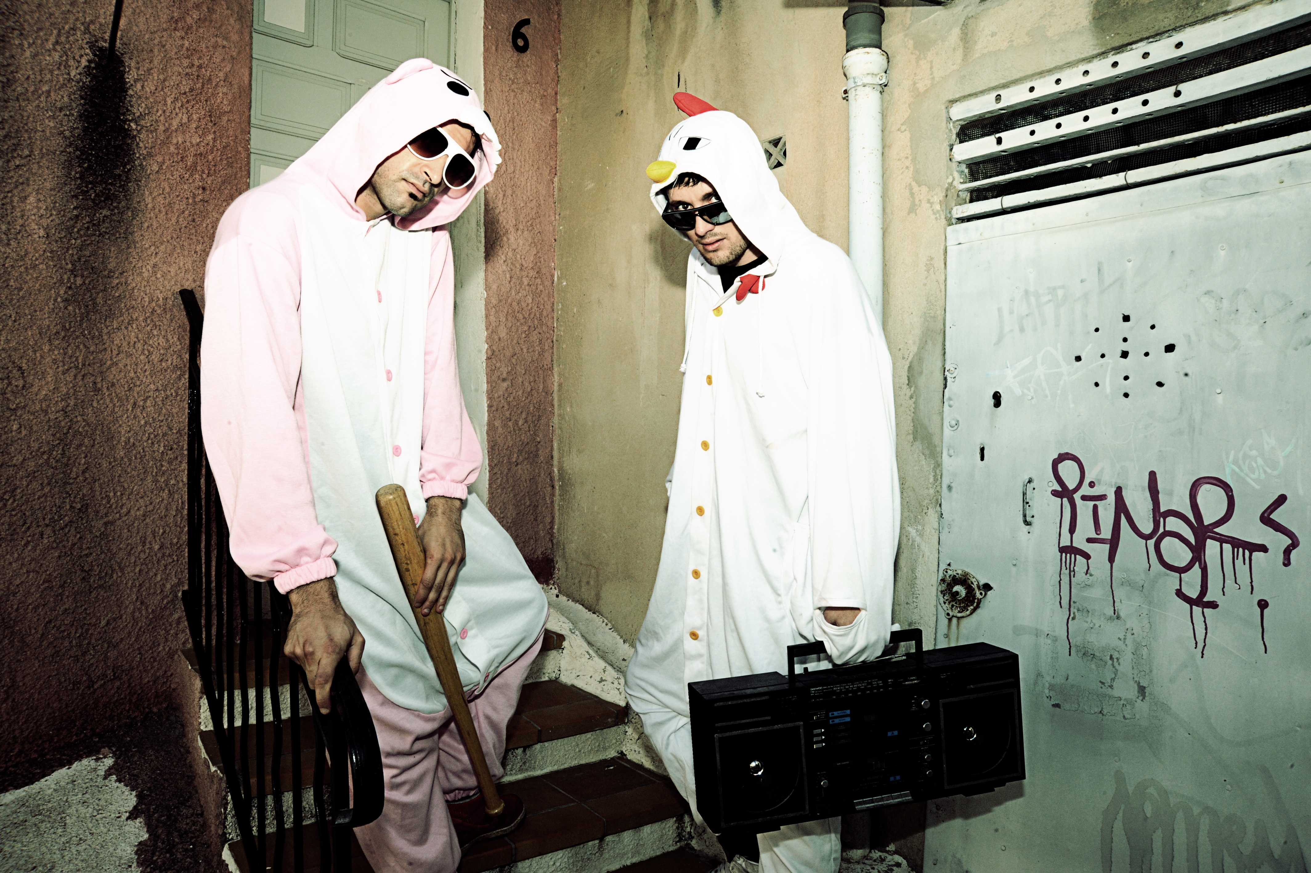 StereoHeroes en 2009